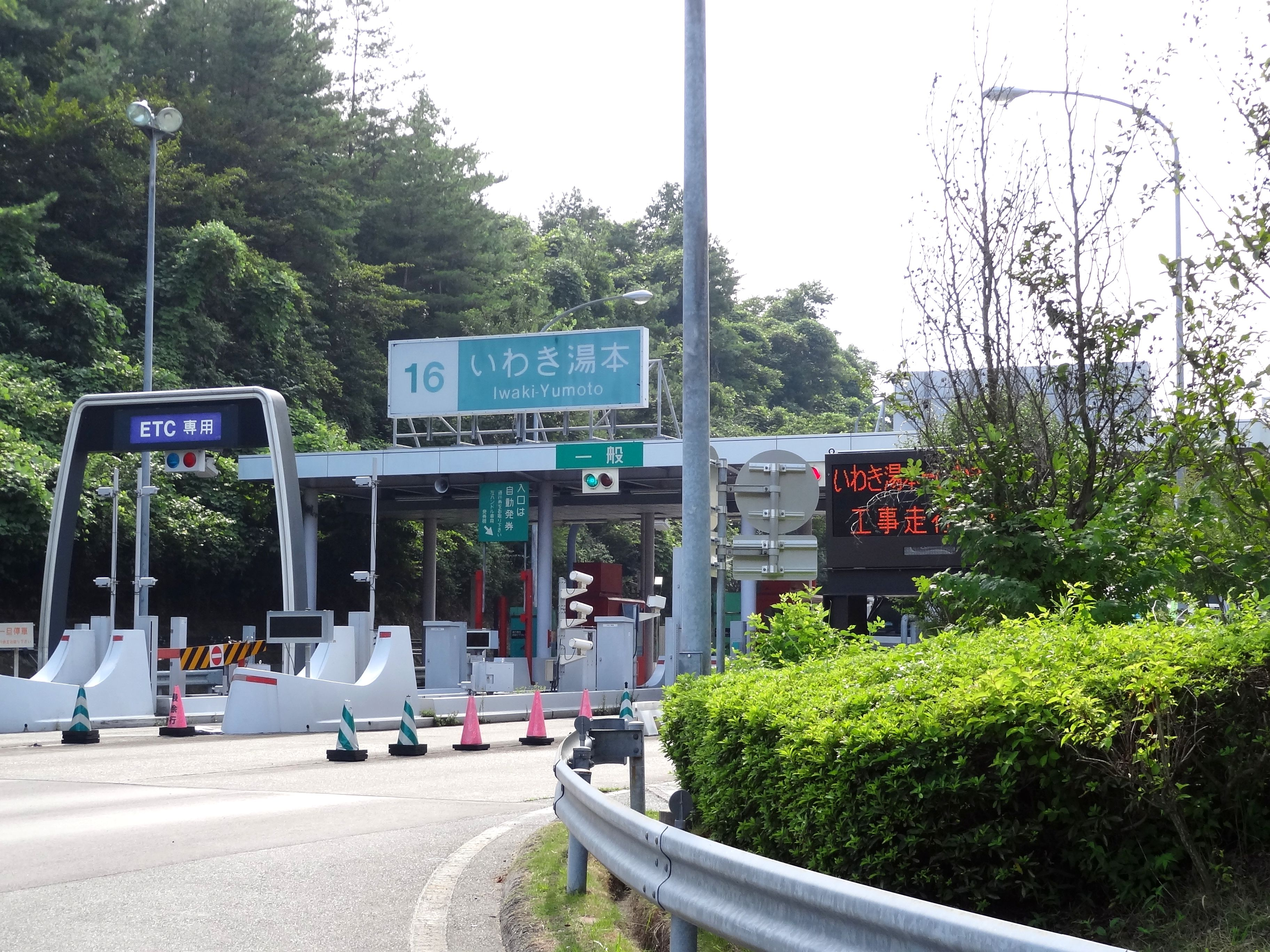 いわき湯本インターチェンジ（料金所付近）